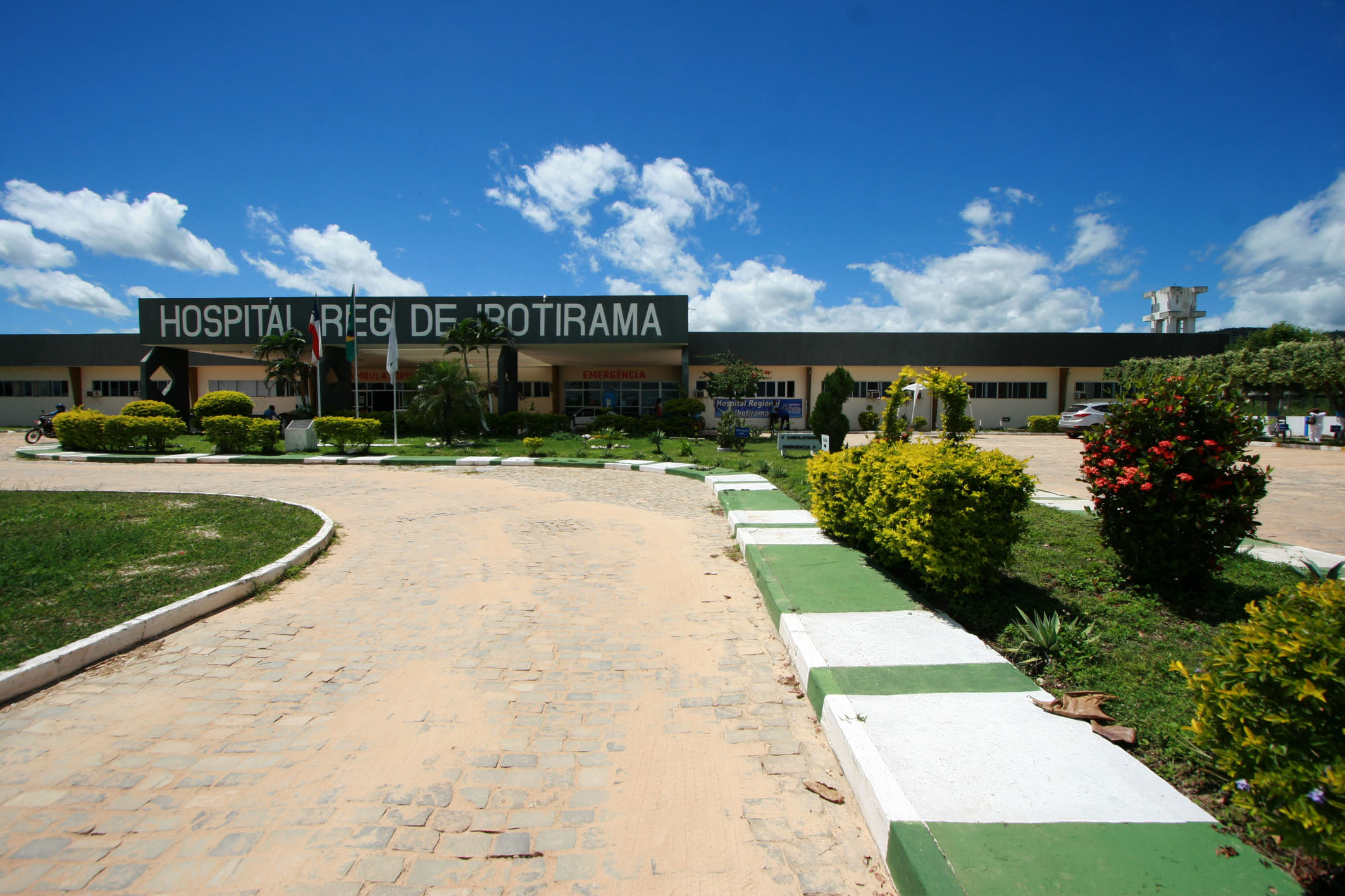 Plenária do Plano Plurianual Participativo em Ibotirama Na foto: Hospital Regional de Ibotirama Autora: Carol Garcia / AGECOM